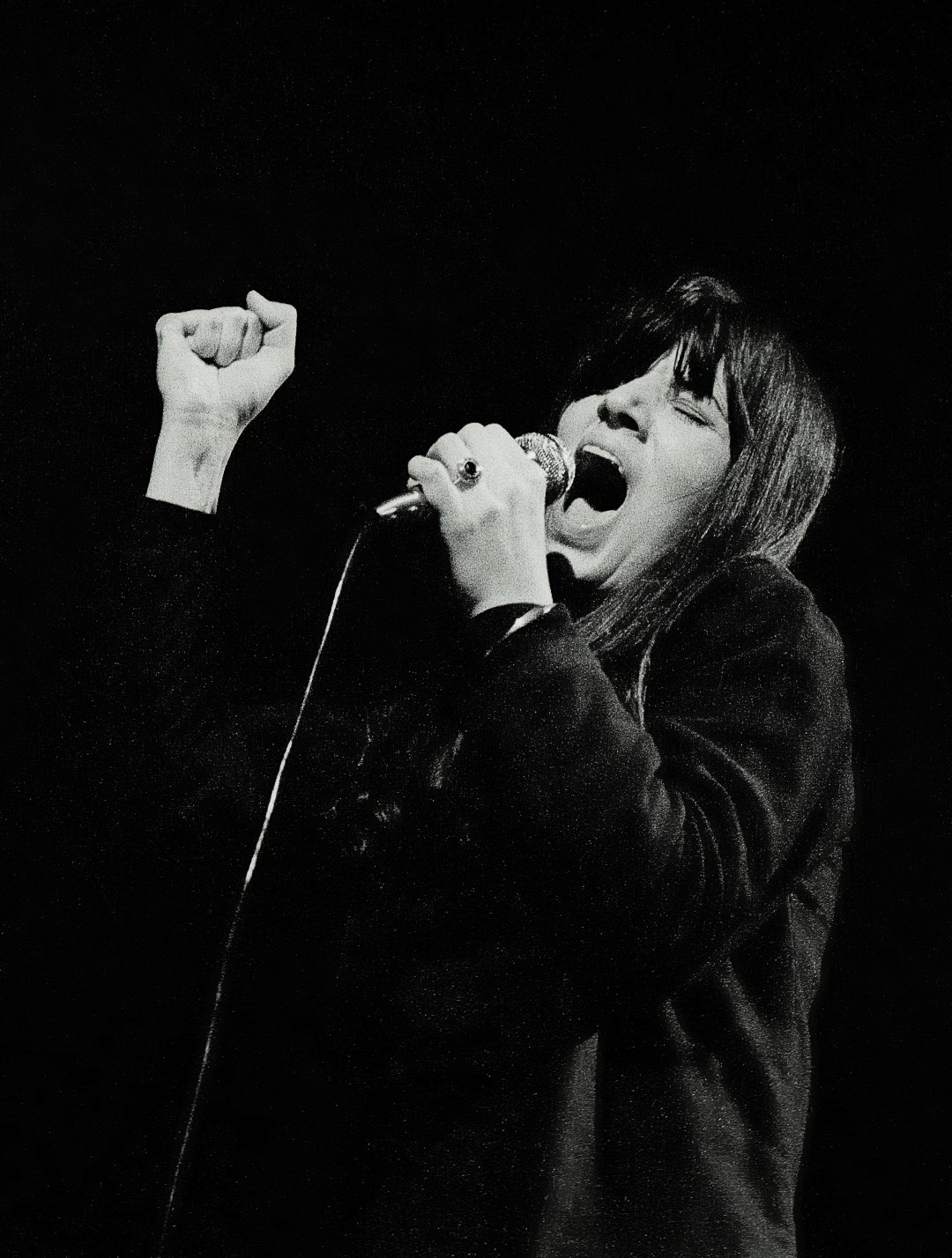 Catherine Ribeiro, Bordeaux 1972, SIGMA Chanson